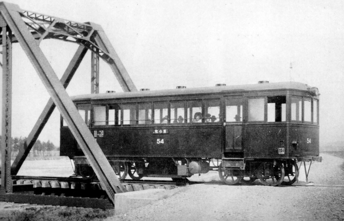 名岐鉄道キボ50形ガソリンカー